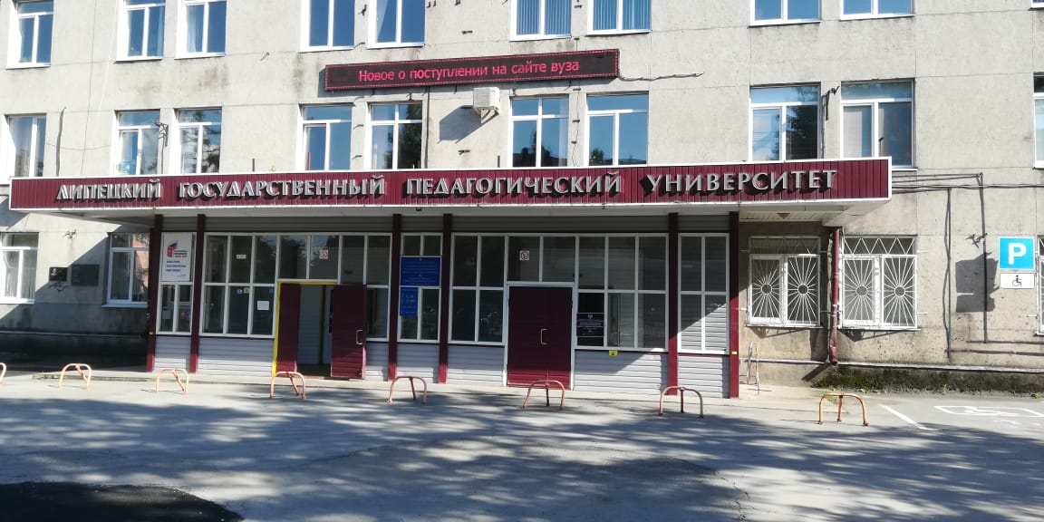 Липецкий государственный педагогический университет